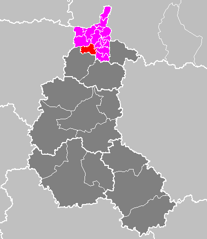 Maps of arrondissements and cantons of France: Arrondissement de Charleville-Mézières - Canton de Signy-l Abbaye.PNG